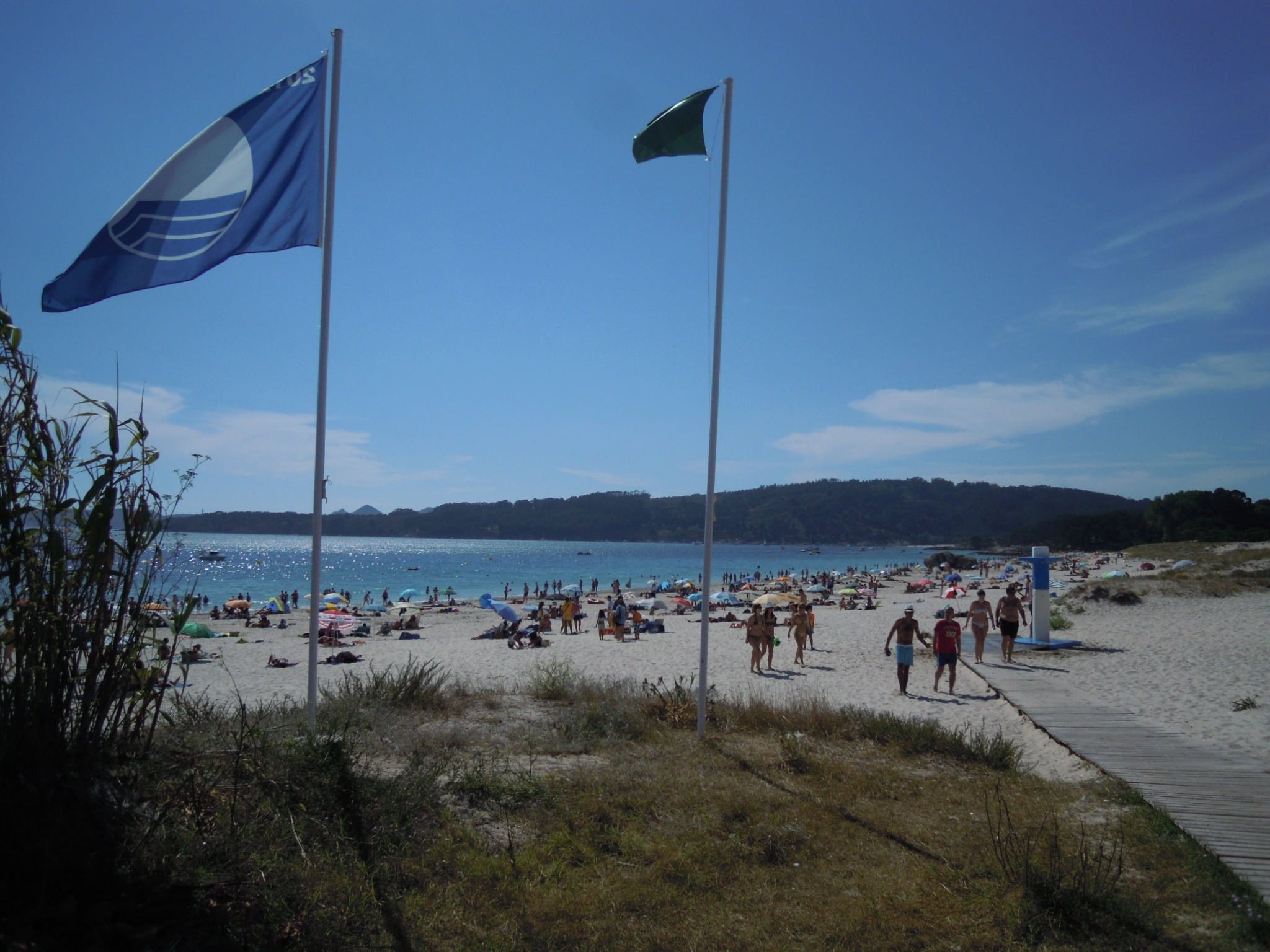 Praia de Nerga, en Nerga (O Hío, Cangas), Bandeira Azul no ano gl:2012